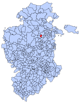 Piérnigas en Burgos